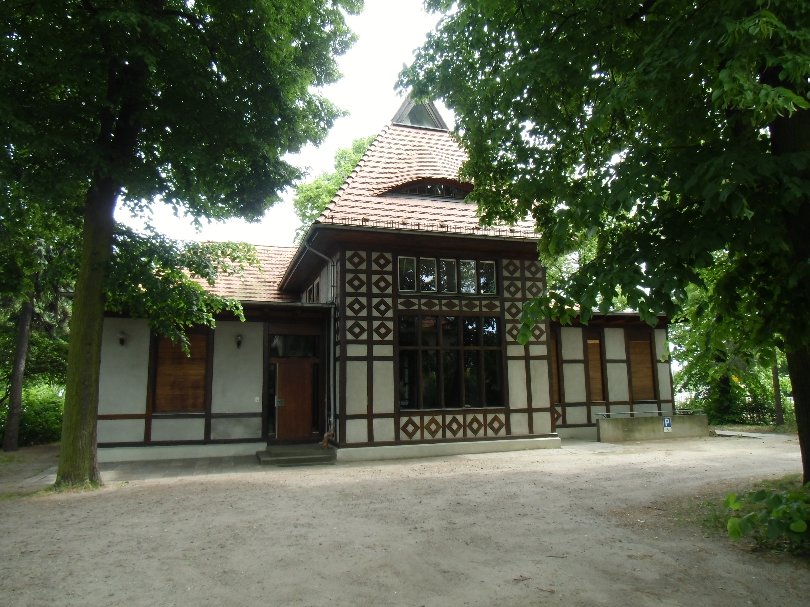 Denkmalgeschützte ehemalige Bierhalle des Restaurants zum Lindengarten Ecke Wartenberger Straße 15-17, erbaut 1913-1914, jetzt Sitz des Gemeindebüros der Evangelischen Kirche Hohenschönhausen